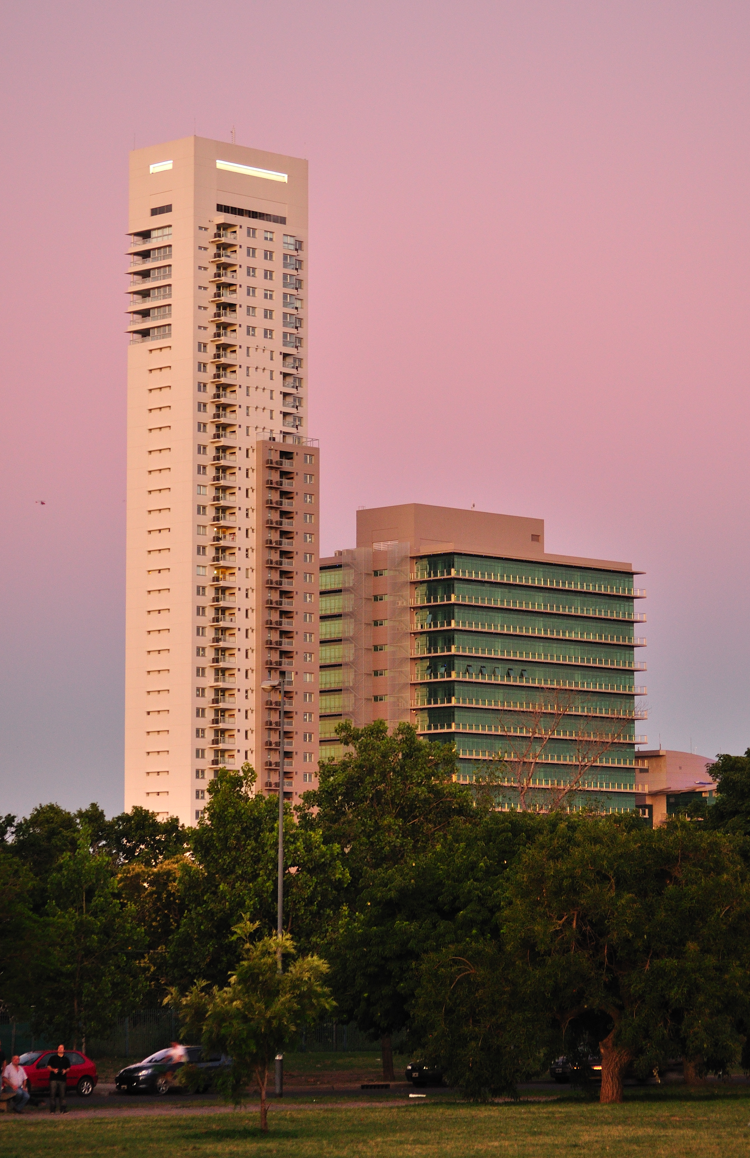 Embarcadero Tower, Rosario, Argentina.